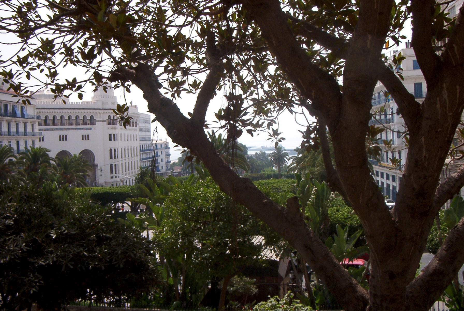 La Grande Poste à Alger